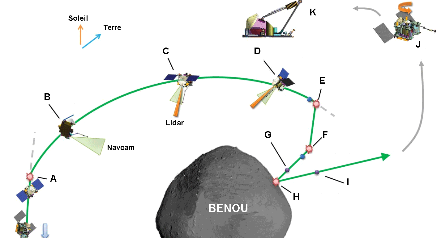 AG Phase Overview. The final four hours prior to contact are performed autonomously onboard, beginning with the orbit departure maneuver.